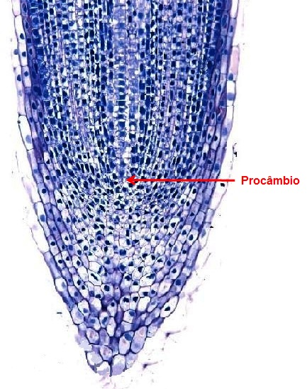 Procâmbio